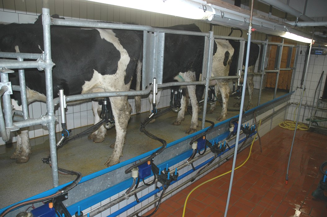 im Melkstand